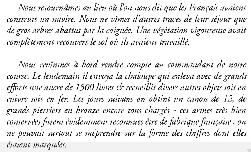 Étienne Beaumont, Vanikoro: Journal d’un médecin légiste sur «l’île du Malheur» où périt Lapérouse, communication à la société de Rochefort, le 20 juin 1832.